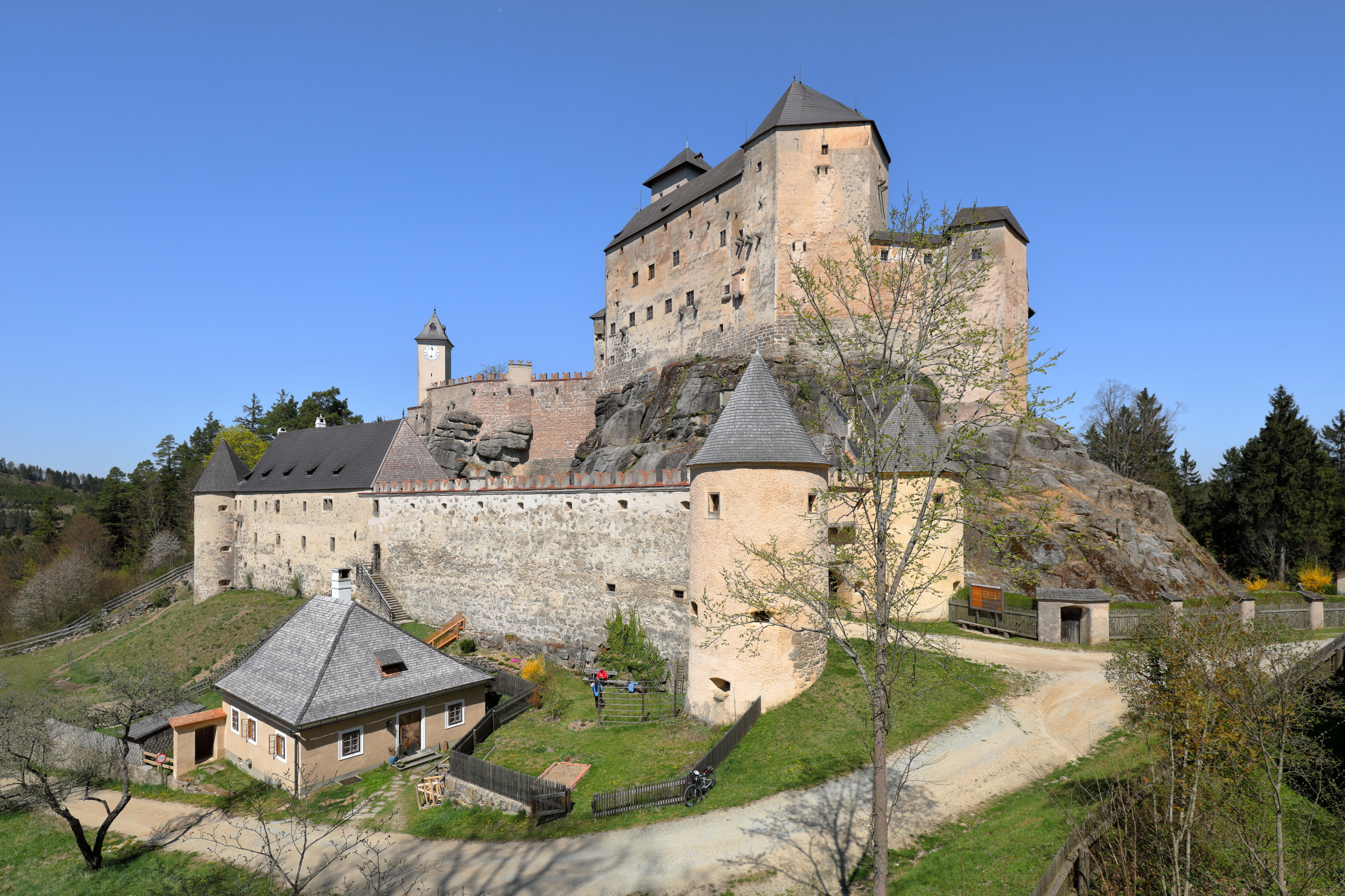 Südansicht der Burg Rappottenstein im westlichen Waldviertel und auf dem Gemeindegebiet der niederösterreichischen Marktgemeinde Rappottenstein.Die bedeutende Burganlage des 12. Jahrhunderts wurde nie erobert und von den Kuenringer errichtet. Nach mehreren Besitzerwechsel kam sie 1664 durch Kauf an die heutigen Besitzer, die Grafen von Abensperg und Traun.